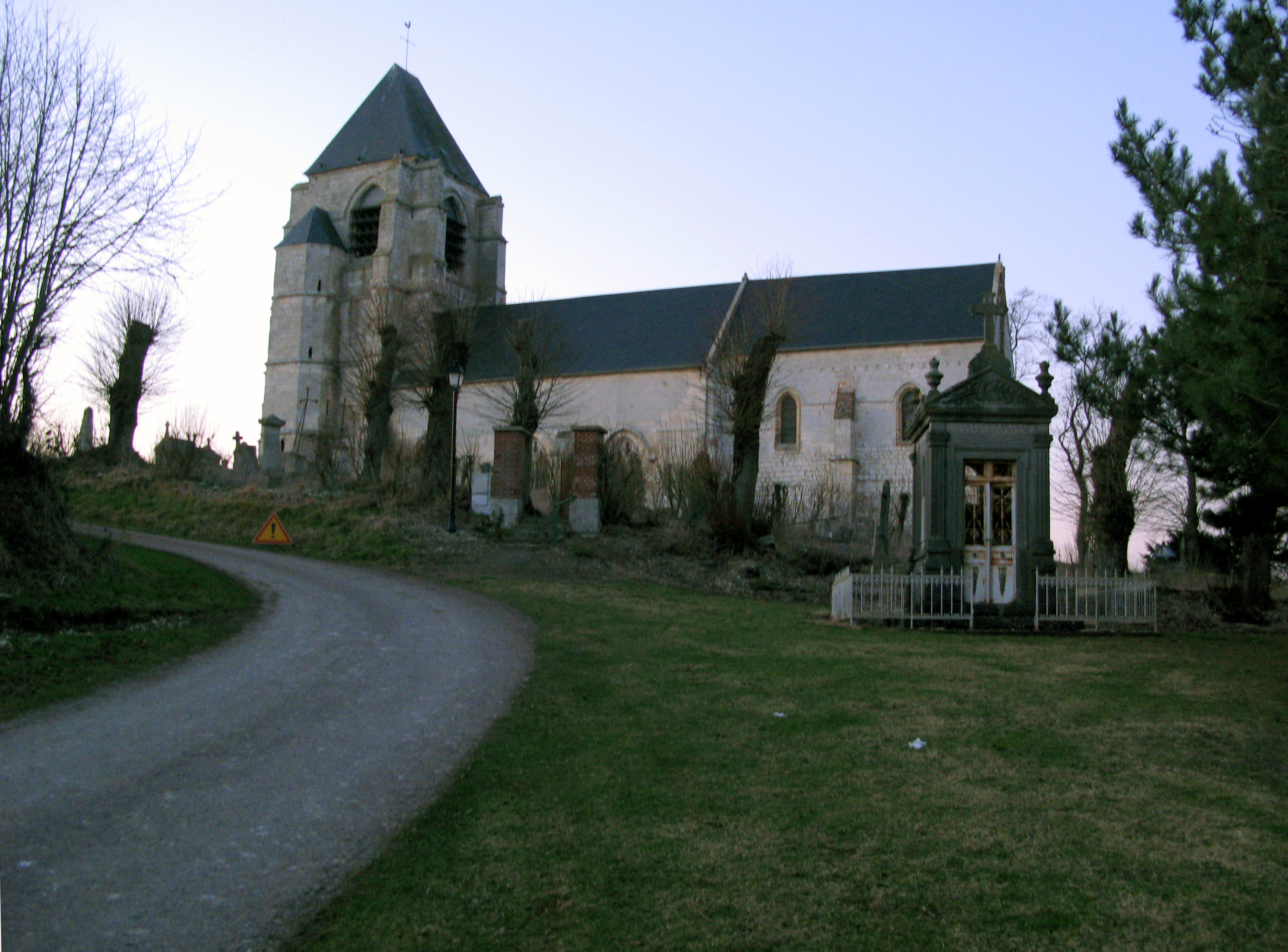 Chaussoy-Epagny (Somme, France) - L'église (vue à la tombée du jour). . .